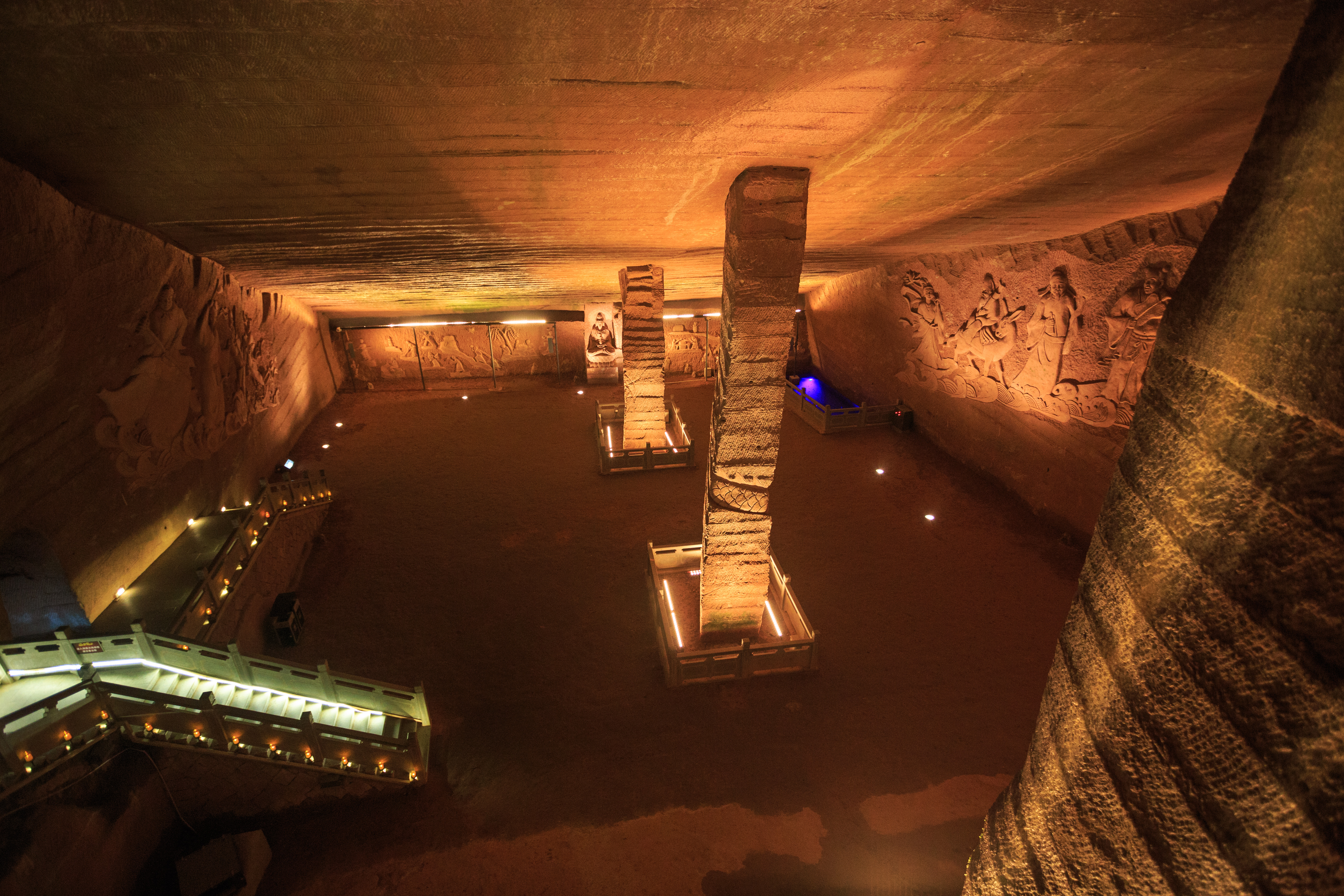 小南海石室 5号洞